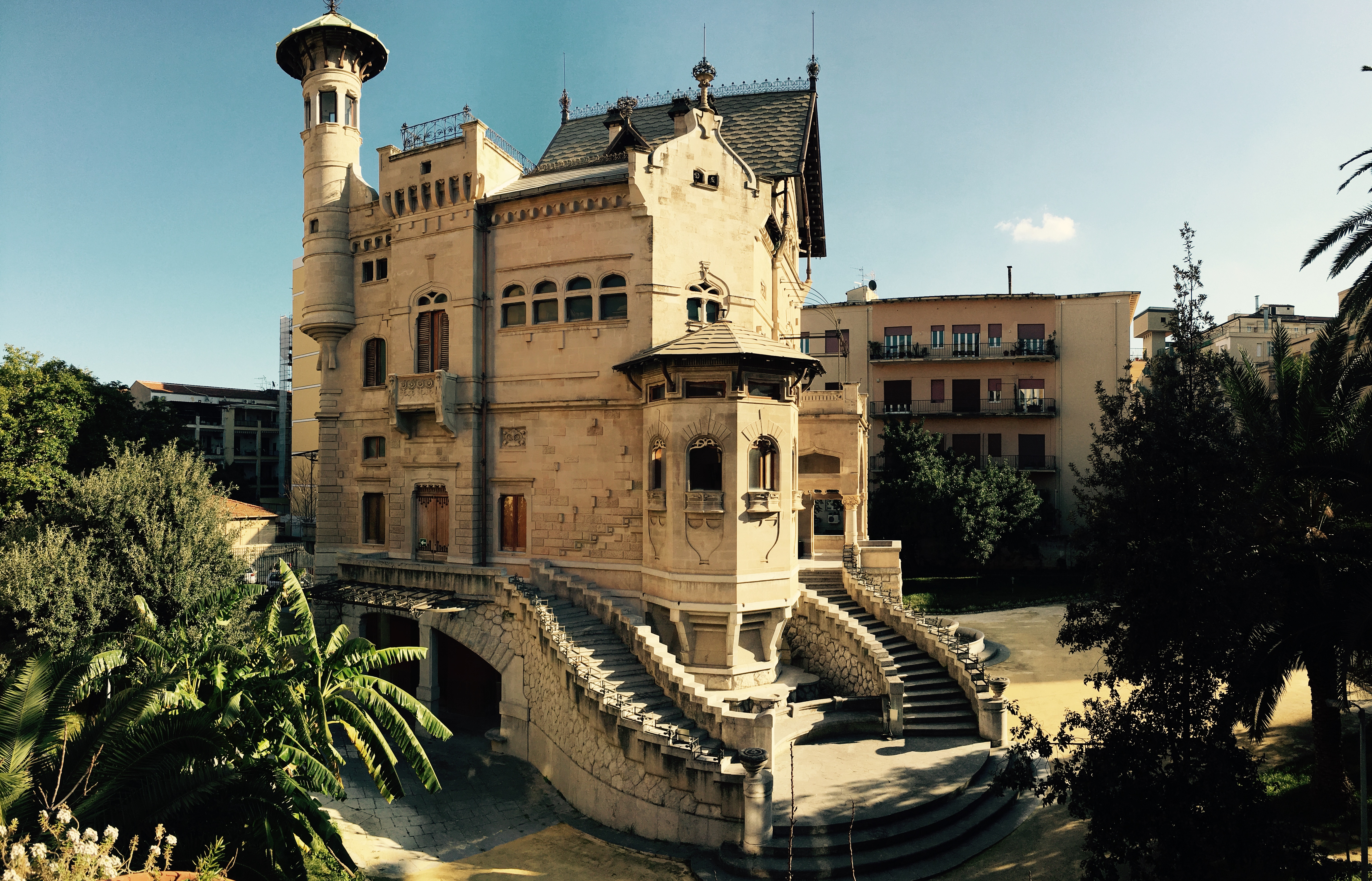 Angolo di visuale della scalinata del Villino Florio di Palermo